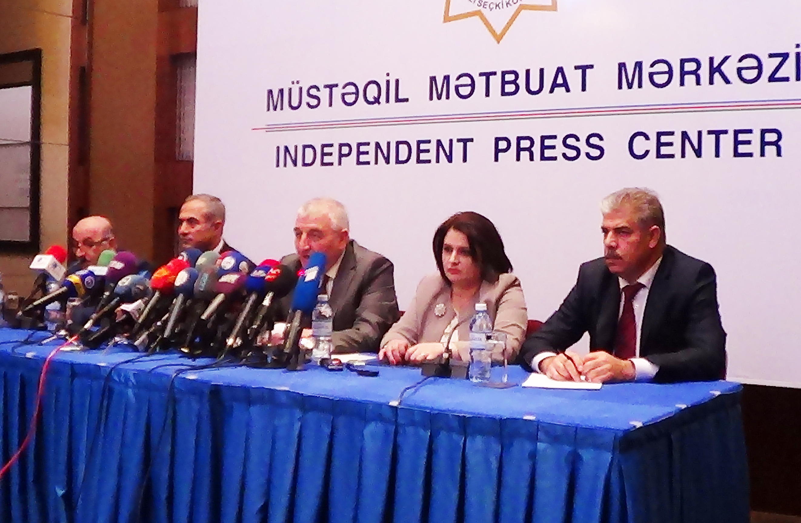 Mərkəzi Seçki Komissiyasının (MSK) prezident seçkiləri ilə bağlı saat 15.00-a olan nəticələri açıqlaması